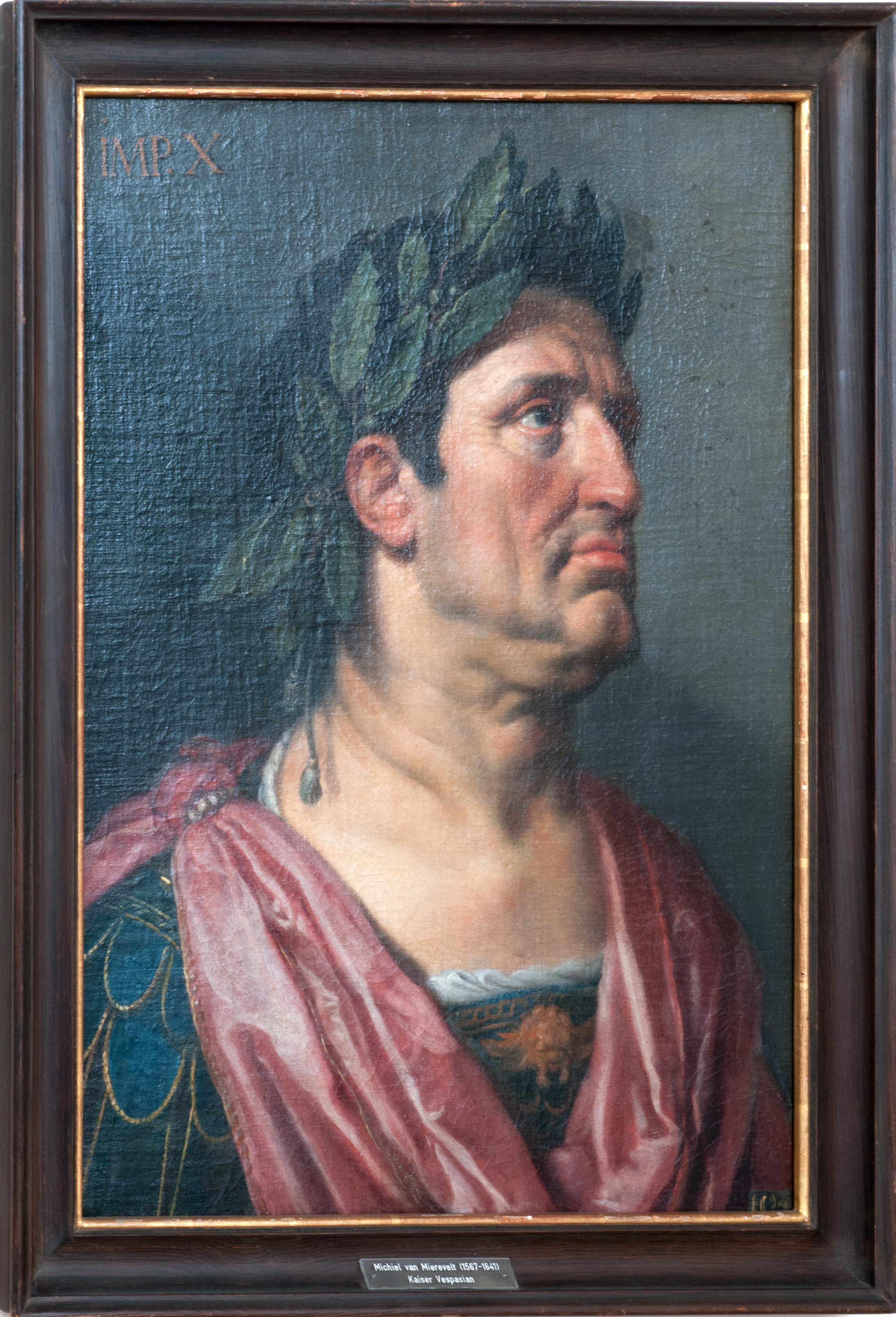 Teil einer Serie römischer Kaiserporträts niederländischer und flämischer Maler